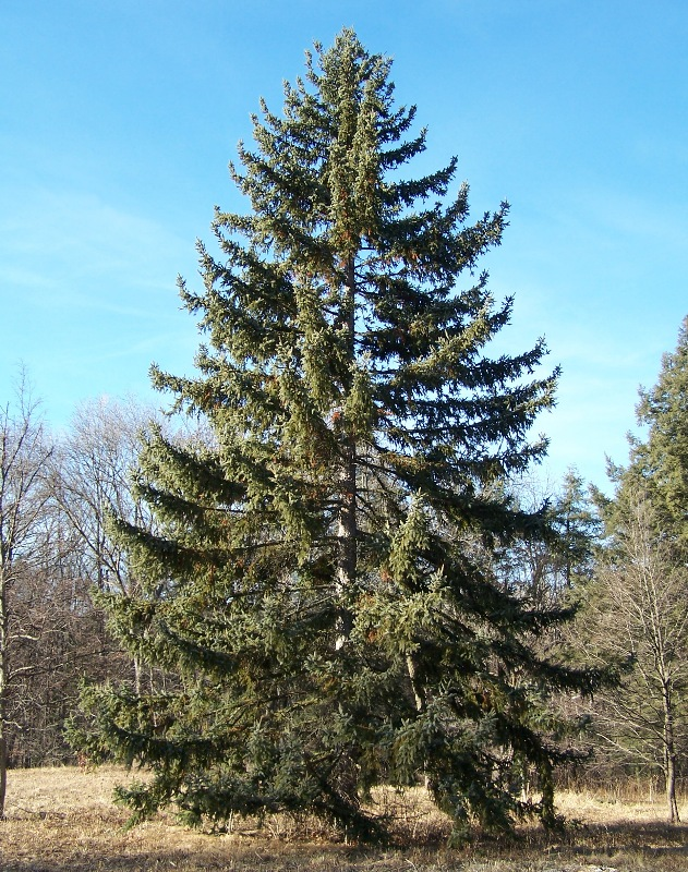 Koyama Spruce Picea koyamae